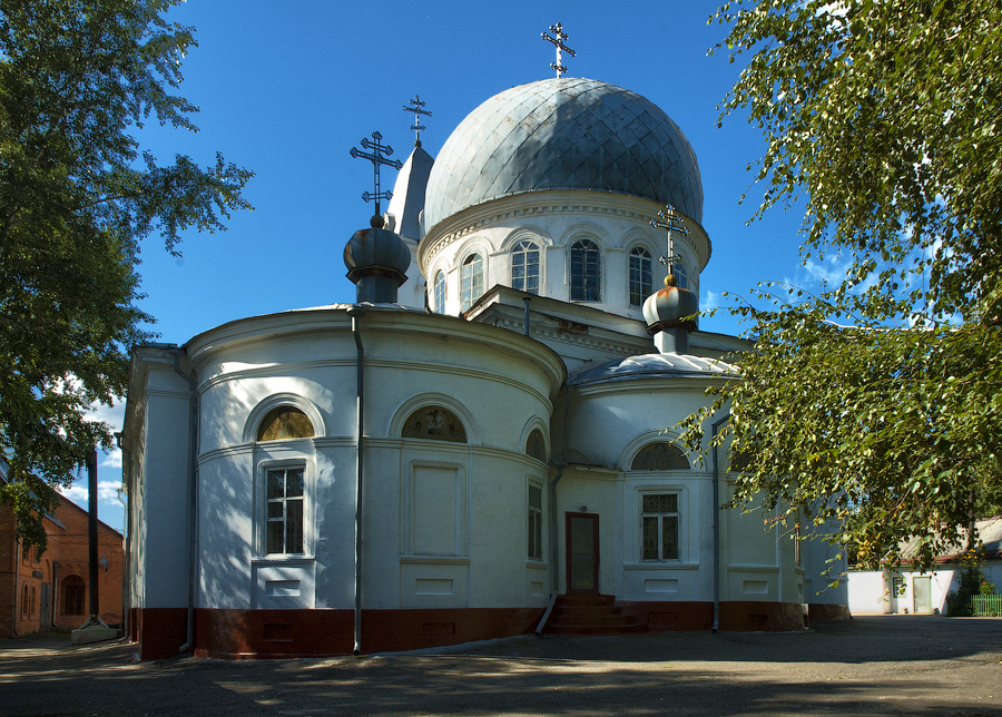 Троицкая церковь с интерьером (Томская область, Томск, октябрьская улица, 43)